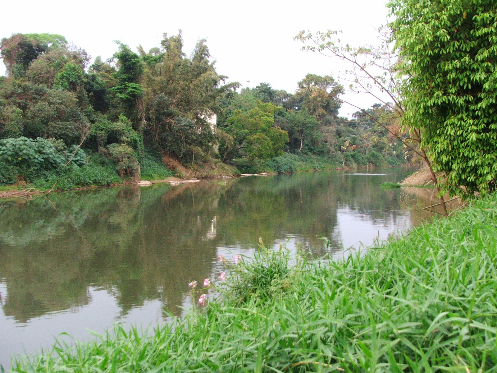 Rio Jaguari